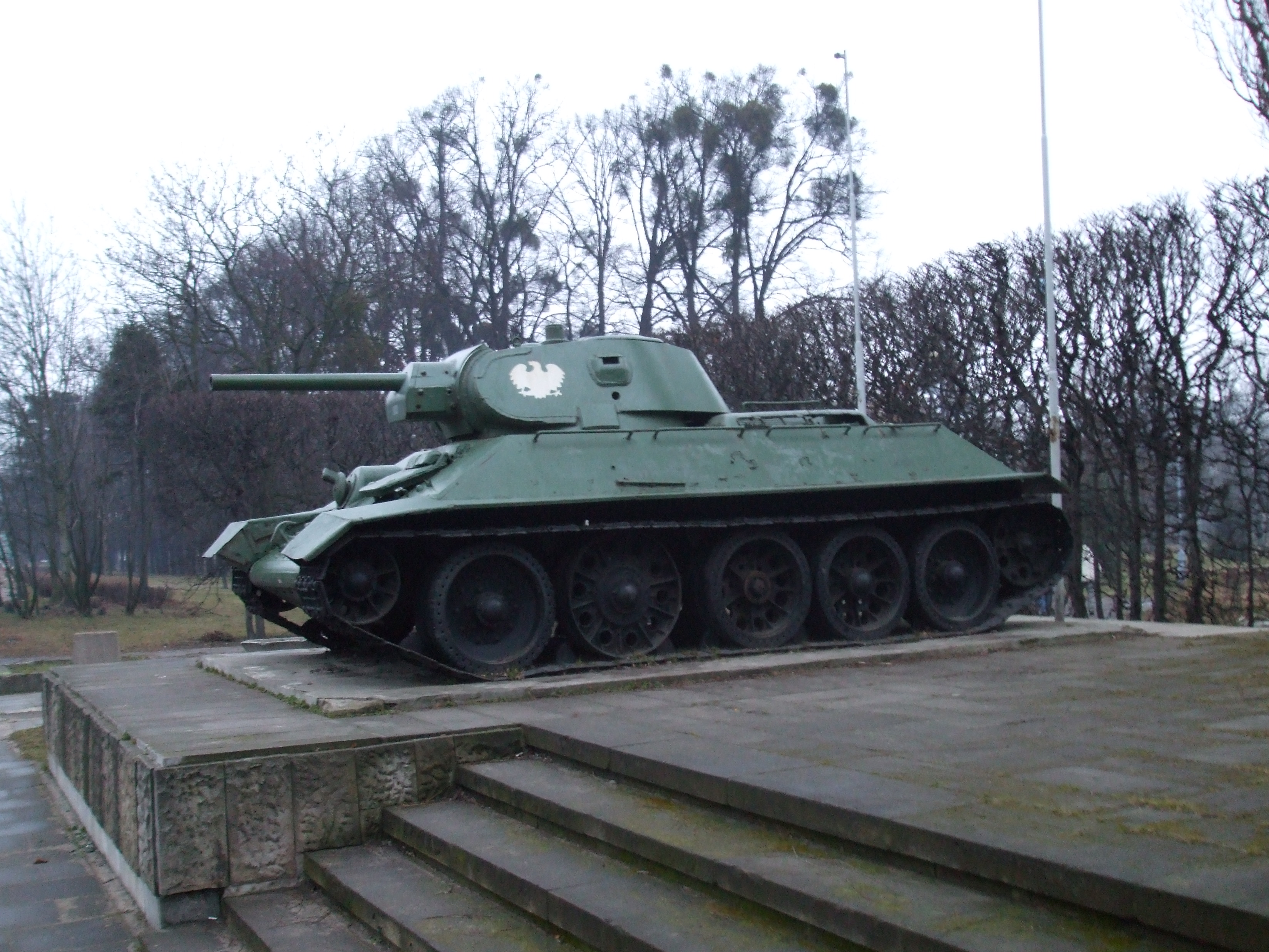 T-34 Model 1941/42 at Zwycięstwa Avenue in Gdańsk.